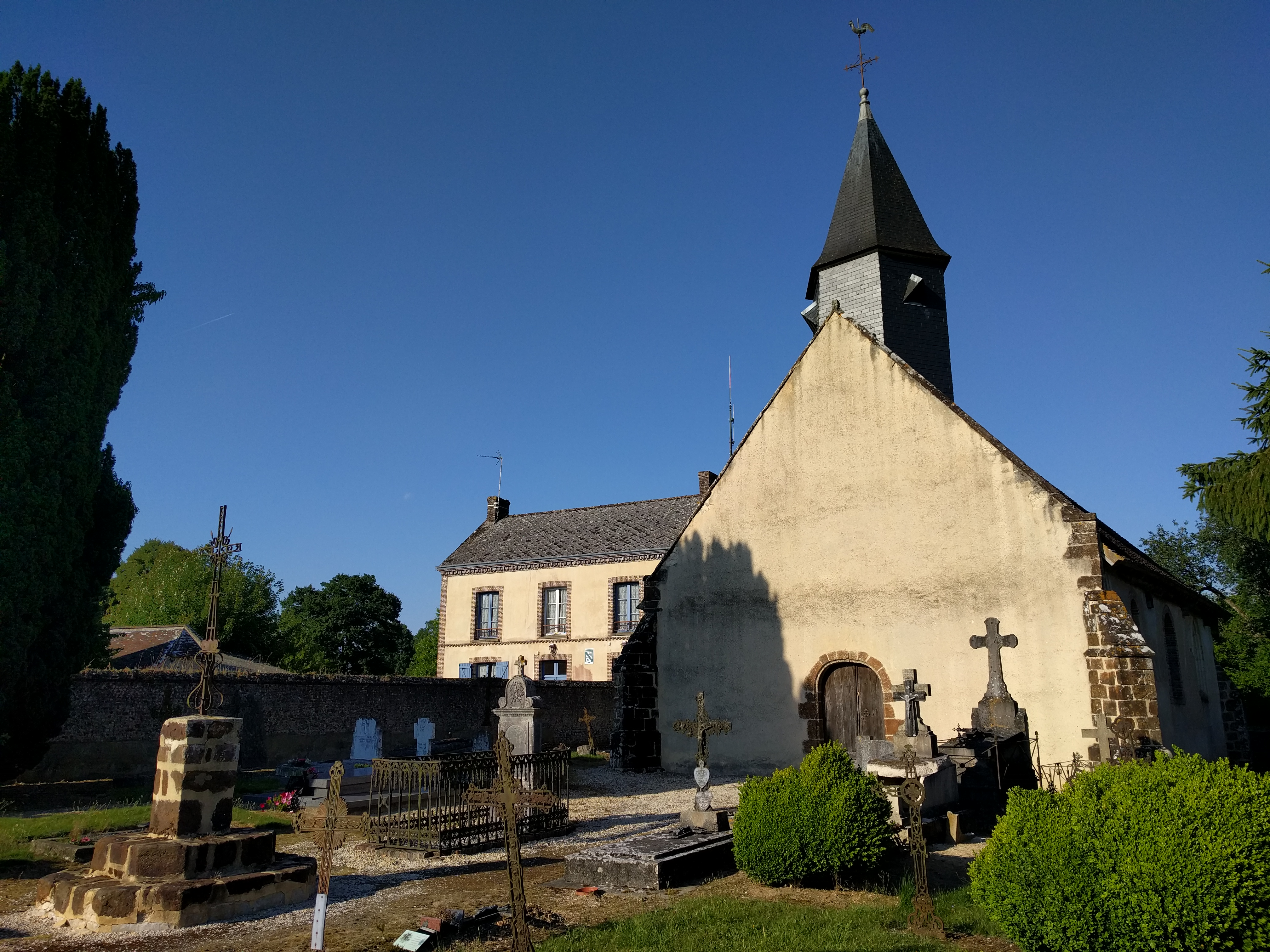 Bresolettes, Orne, Normandía